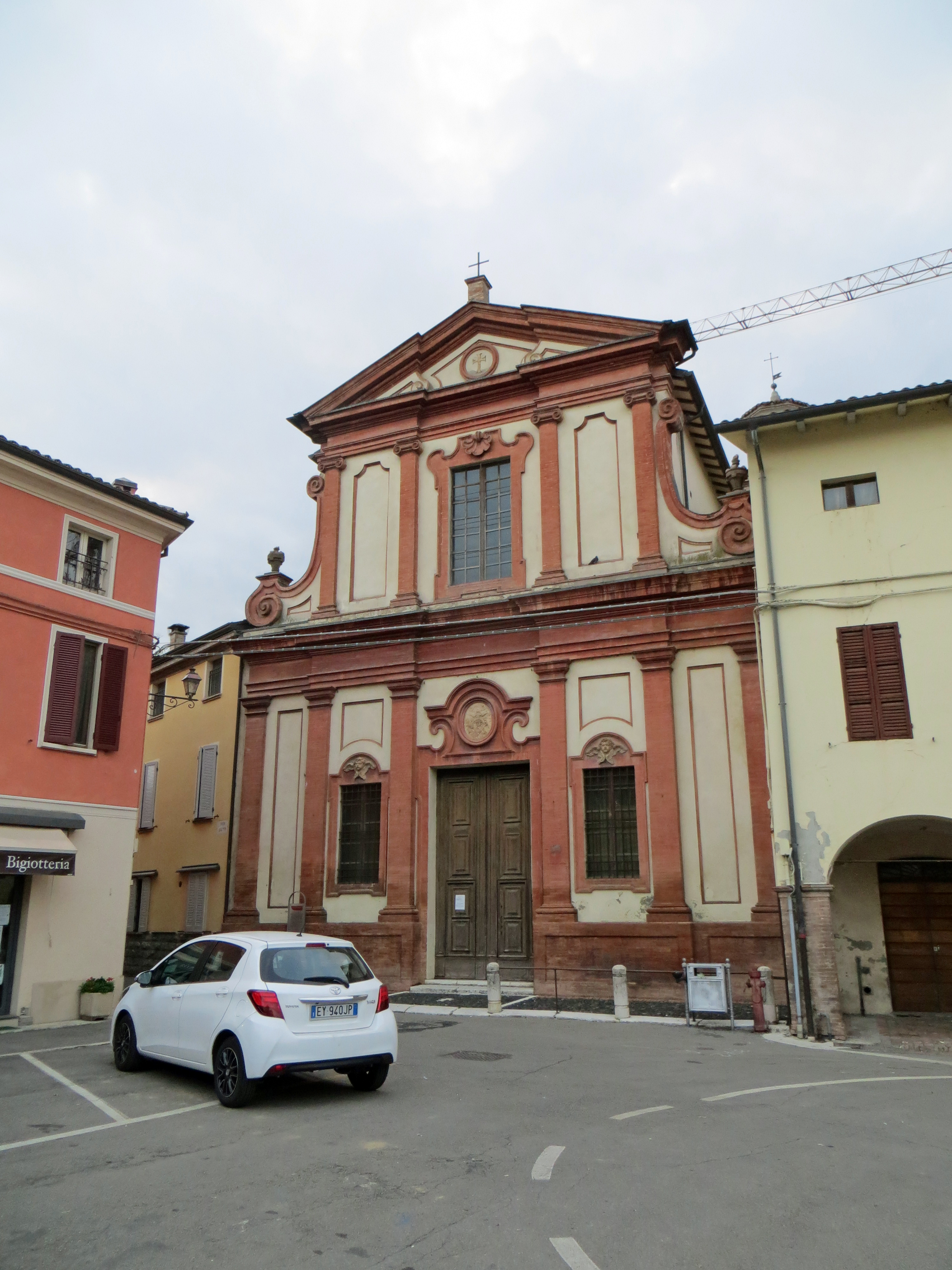 Oratorio di Santa Maria Assunta (Fontanellato) - facciata